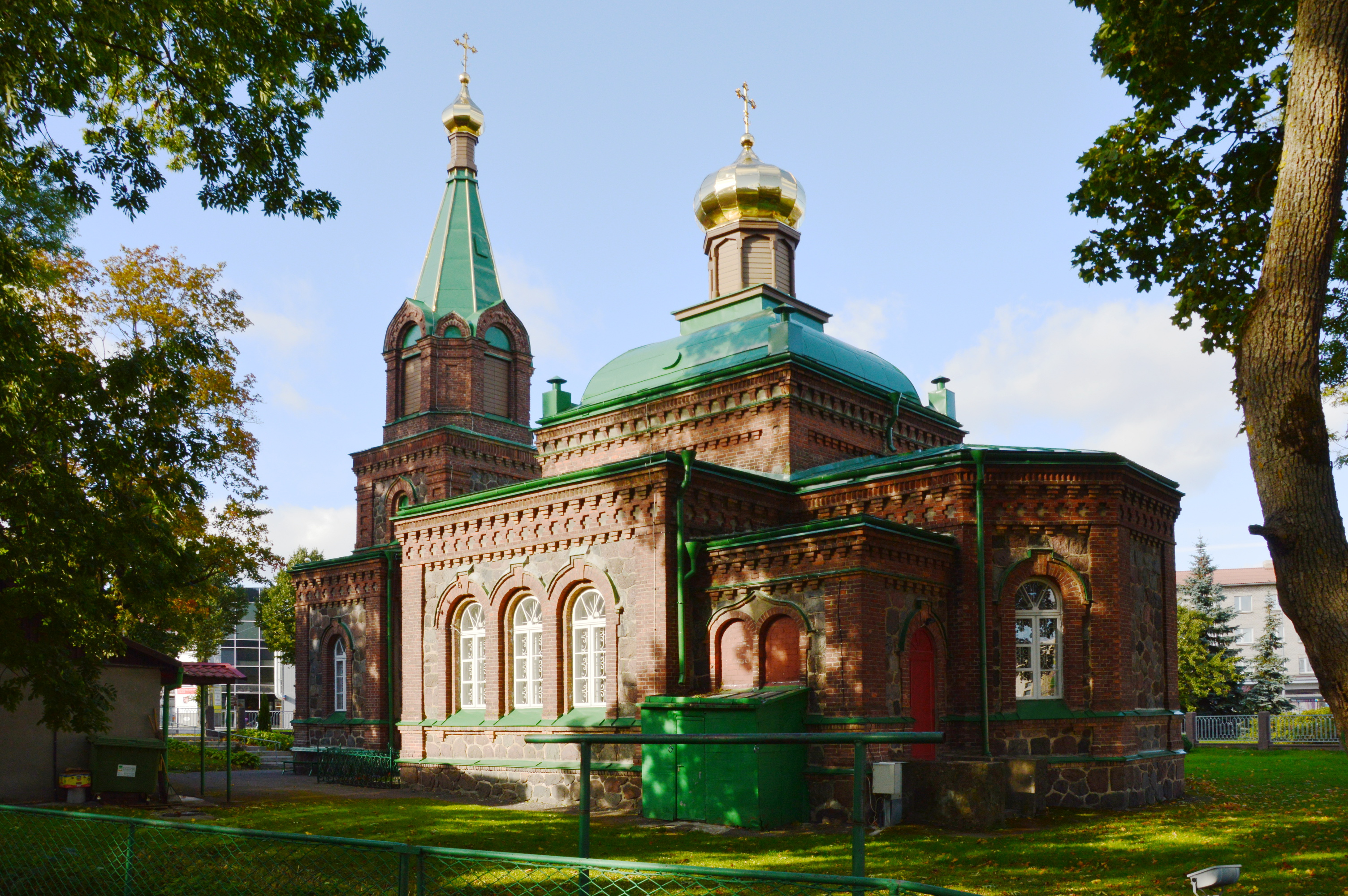 Jõhvi Issanda Ristimise kirik